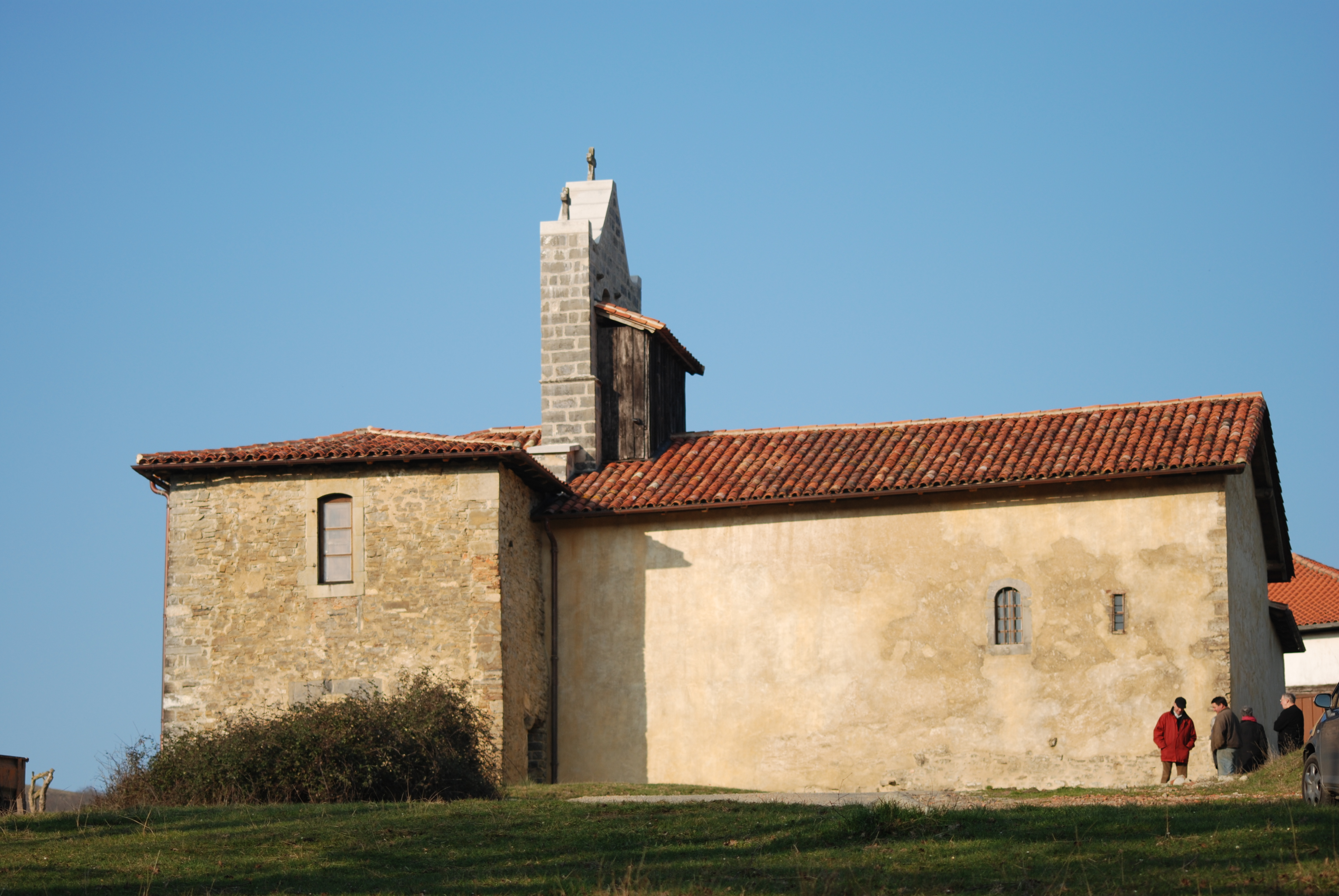 L'église Saint-Nicolas d'Harambeltz, classée Monument historique.